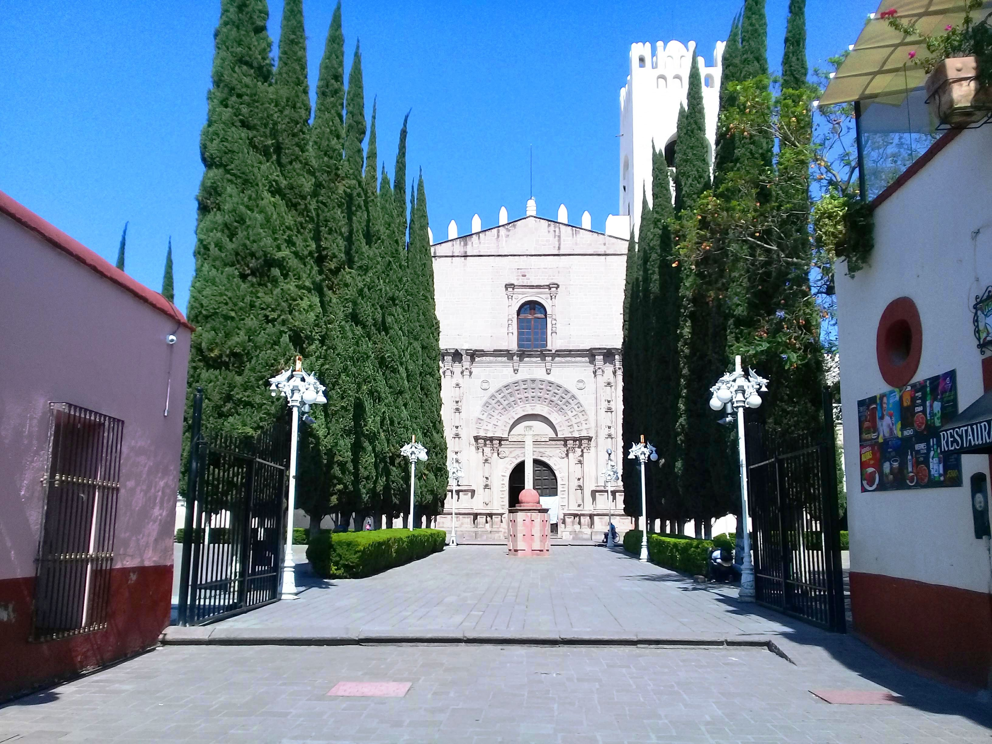 Templo y exconvento de San Nicolás de Tolentino en Actopan, Hidalgo, México.